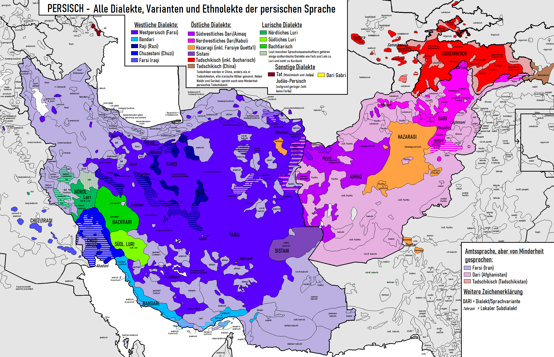 Persische Dialekte Parsian Dialects